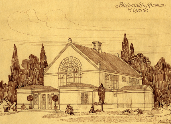 photos, uppsala, sweden